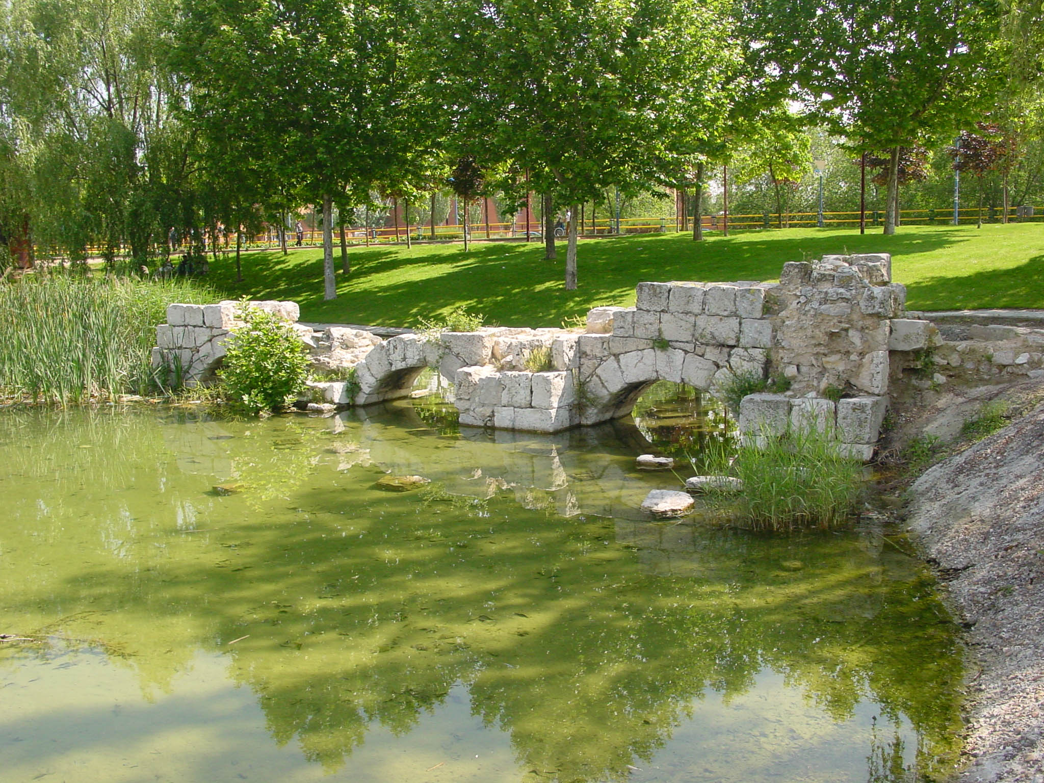 Puente de piedra sobre el río Esgueva en Valladolid, España. Lo mandó construir el emperador Carlos I. Se le conocía como puente del Emperador hasta el siglo XVII en que por acuerdo del Ayuntamiento se le cambió el nombre por puente de la Reina. En la imagen se ven las ruinas que quedan en el siglo XXI.